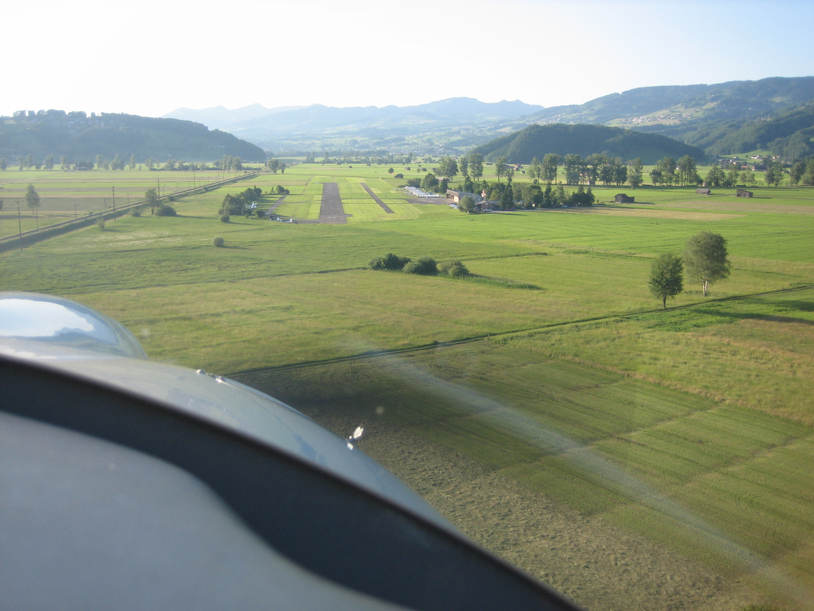 Anflug auf Piste 34L am Flugplatz Schänis (links im Hintergrund der Benkner Büchel)